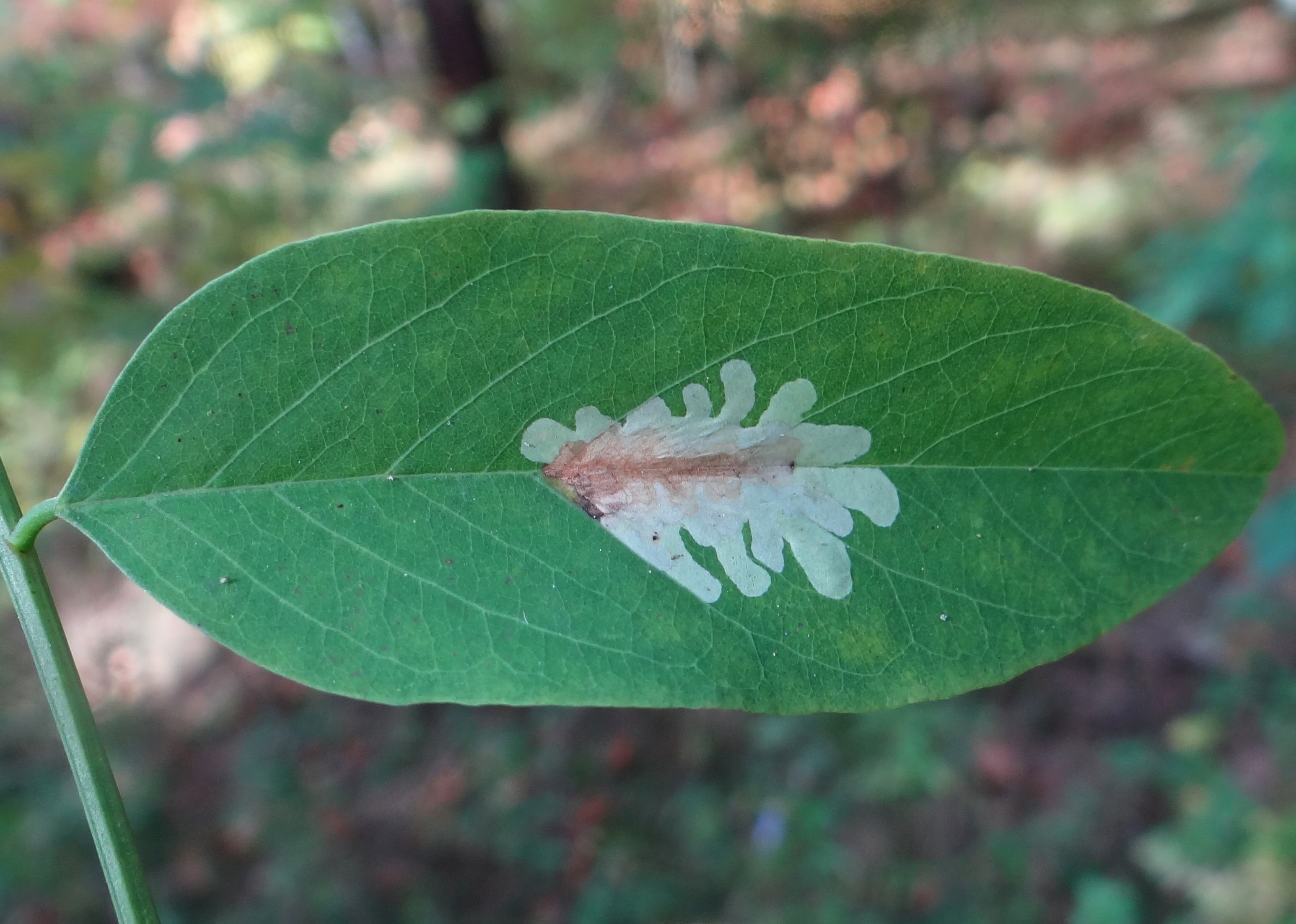 Parectopa robiniella - mines of the leaves. Location: Poland, Puszcza Niepołomicka